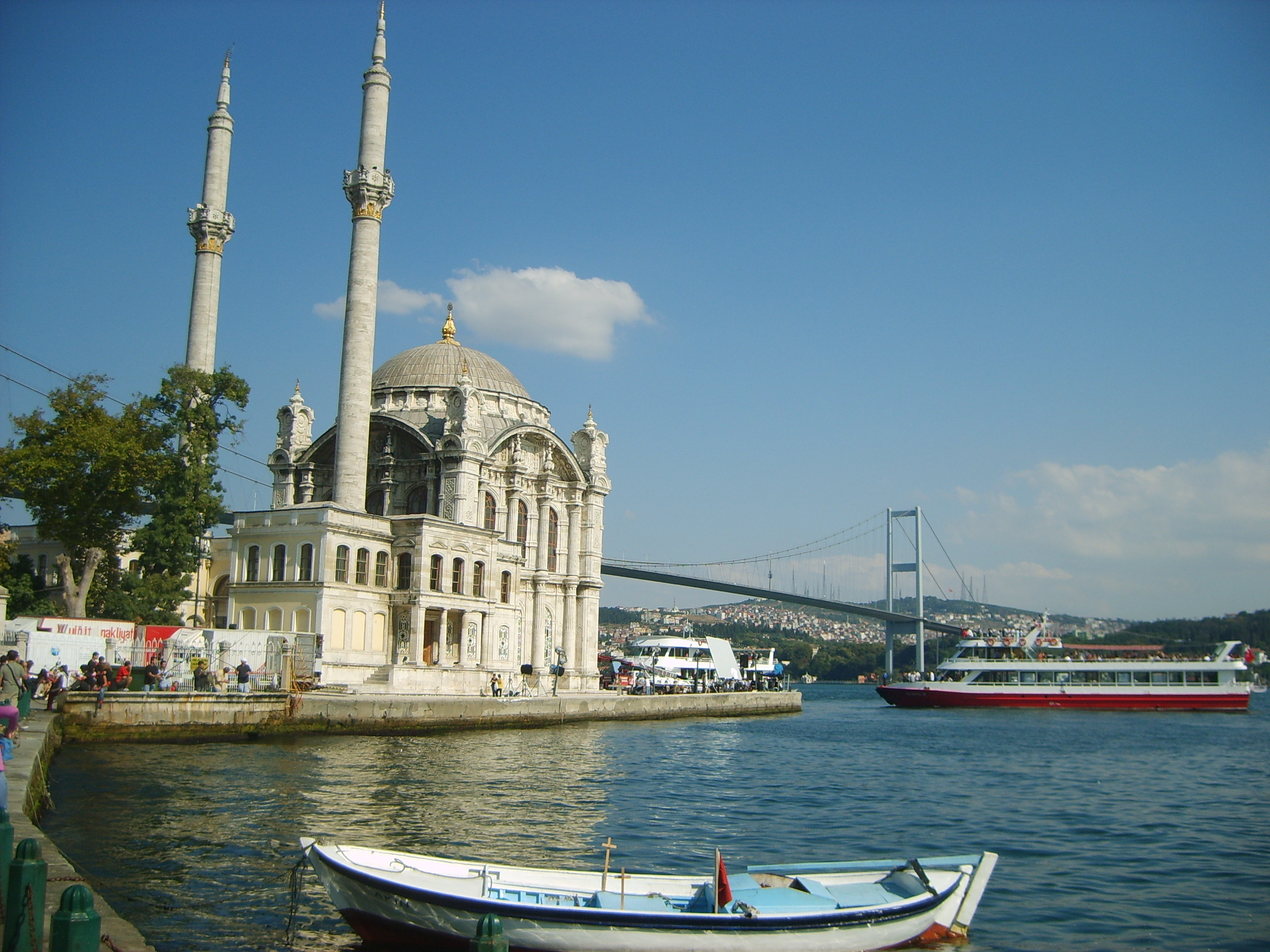 Ortaköy camii, İstanbul